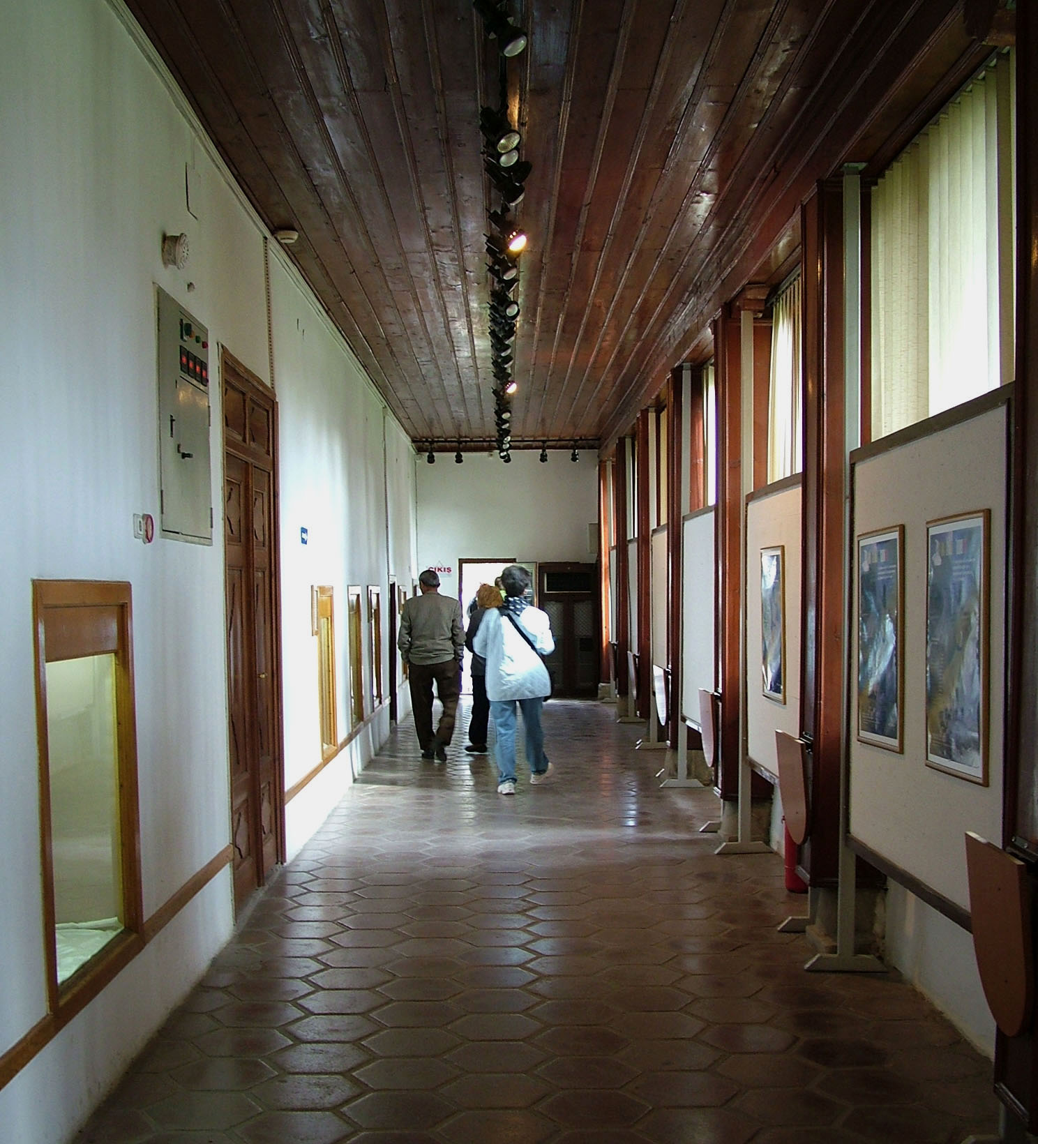 Kolostorszárny a Mevlana Múzeumban (Konya, Törökország)